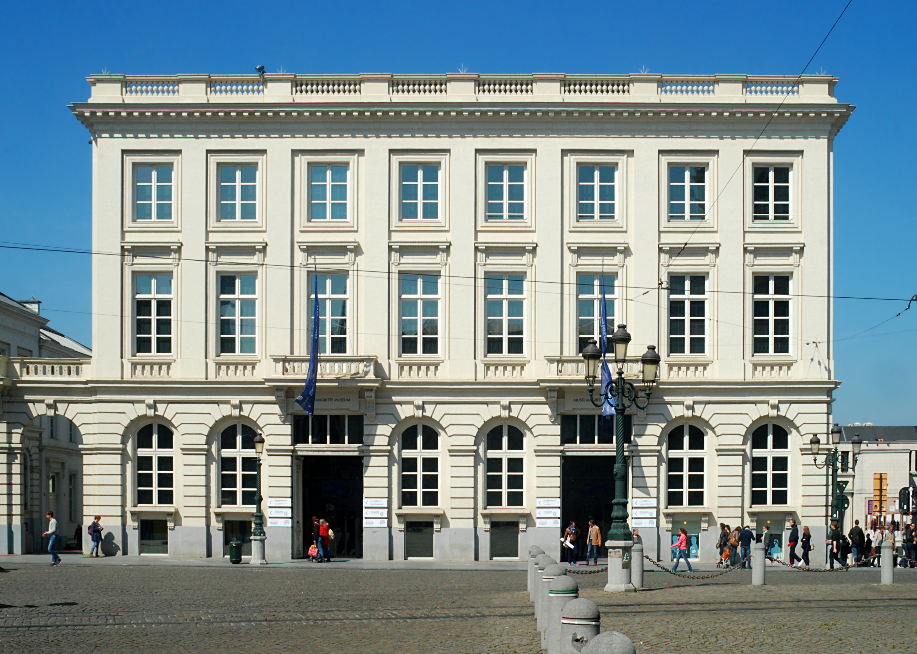 Belgique - Bruxelles - Place Royale - Hôtel du Lotto